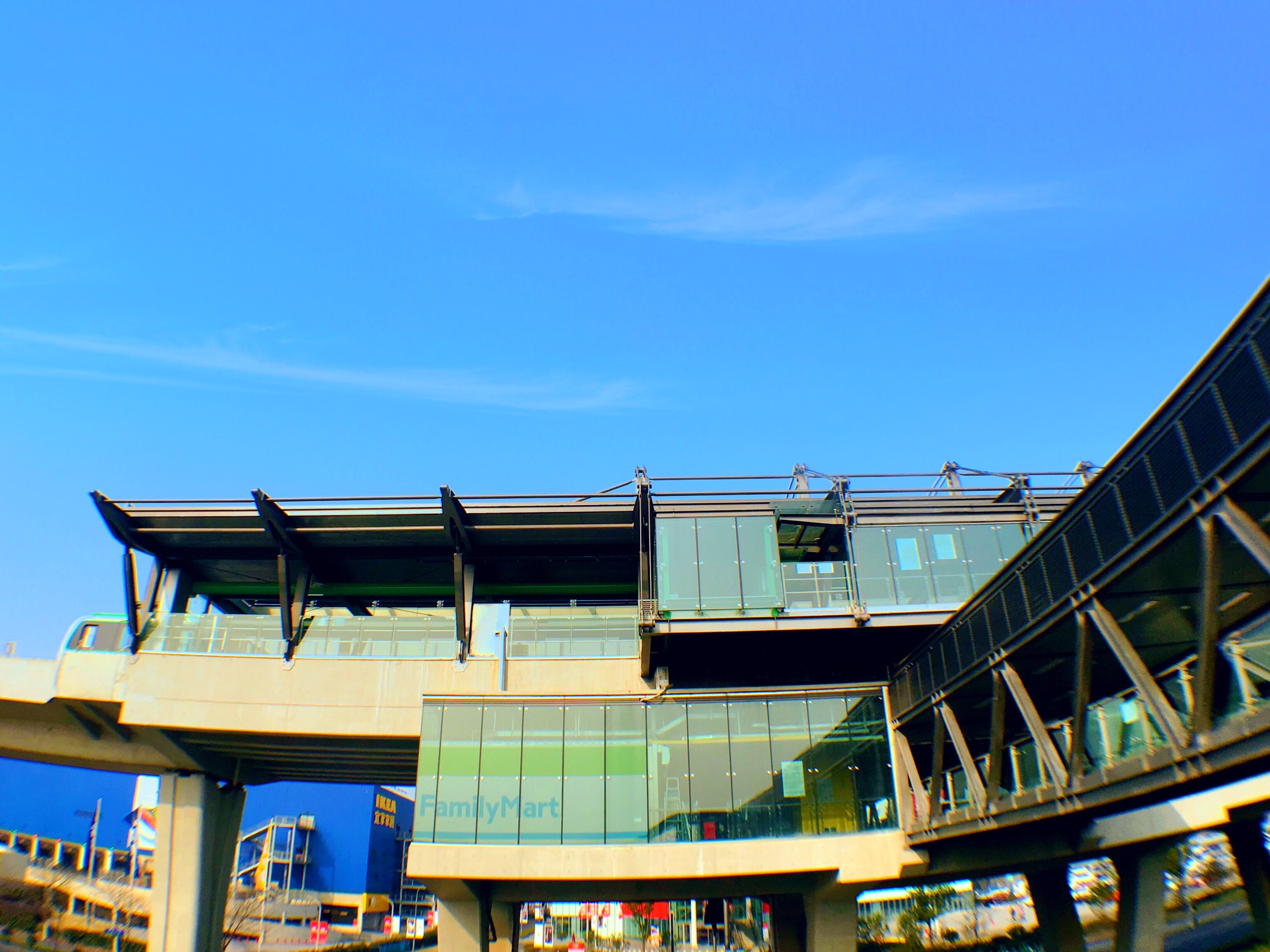 無錫地鐵雲林站外景